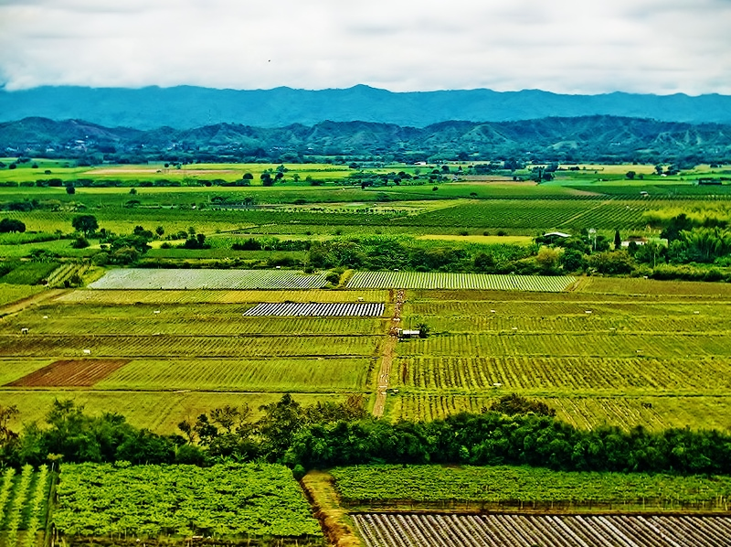 Cultivos diversos, diferentes verdes. La Unión, Valle del Cauca.